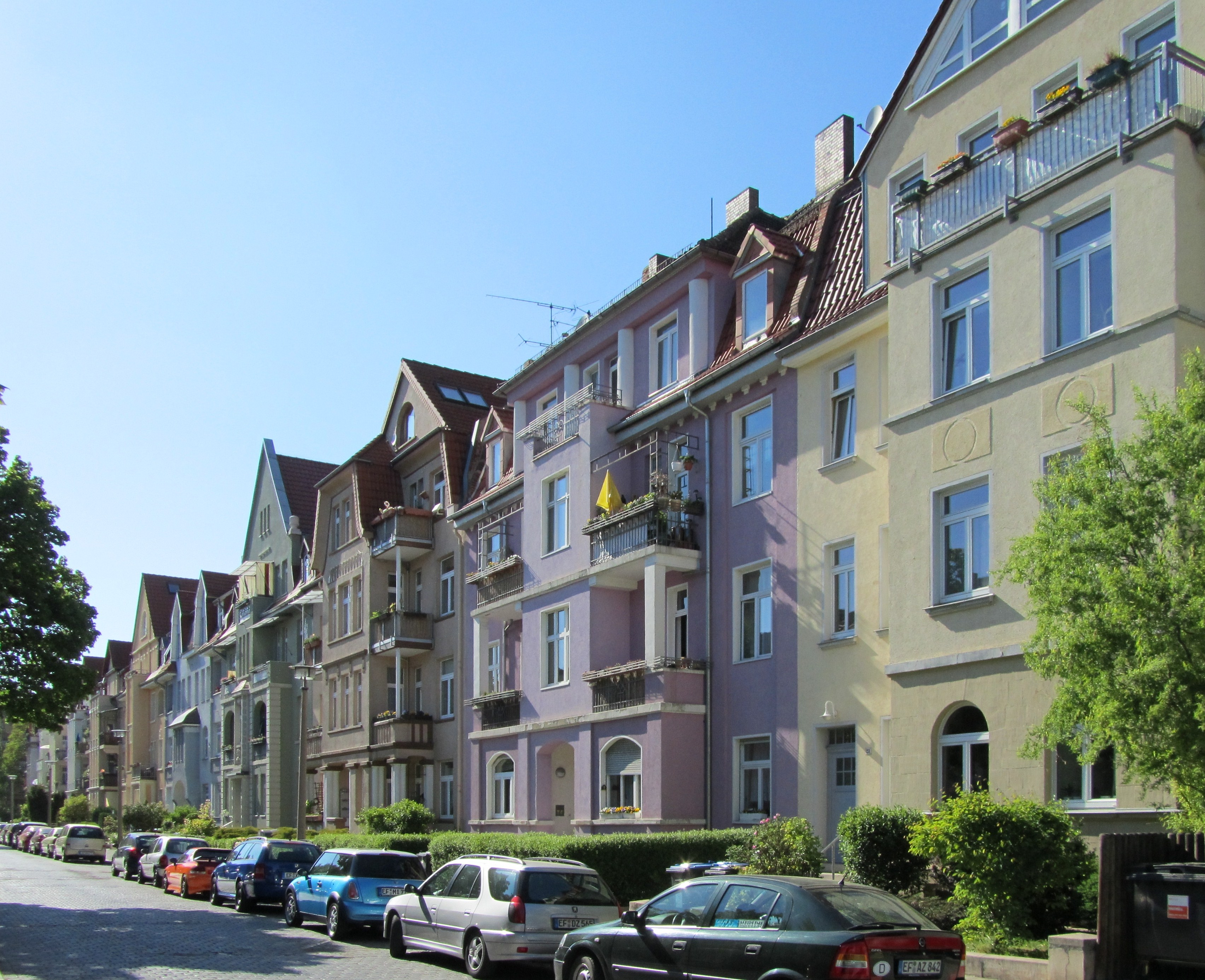 Nonnenrain im Erfurter Stadtteil Daberstedt.